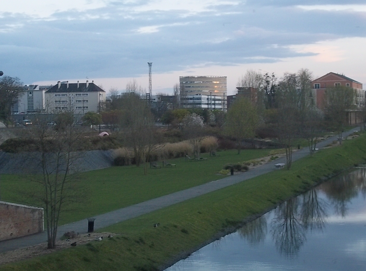 Parc de l'ile aux planches - Le Mans - France